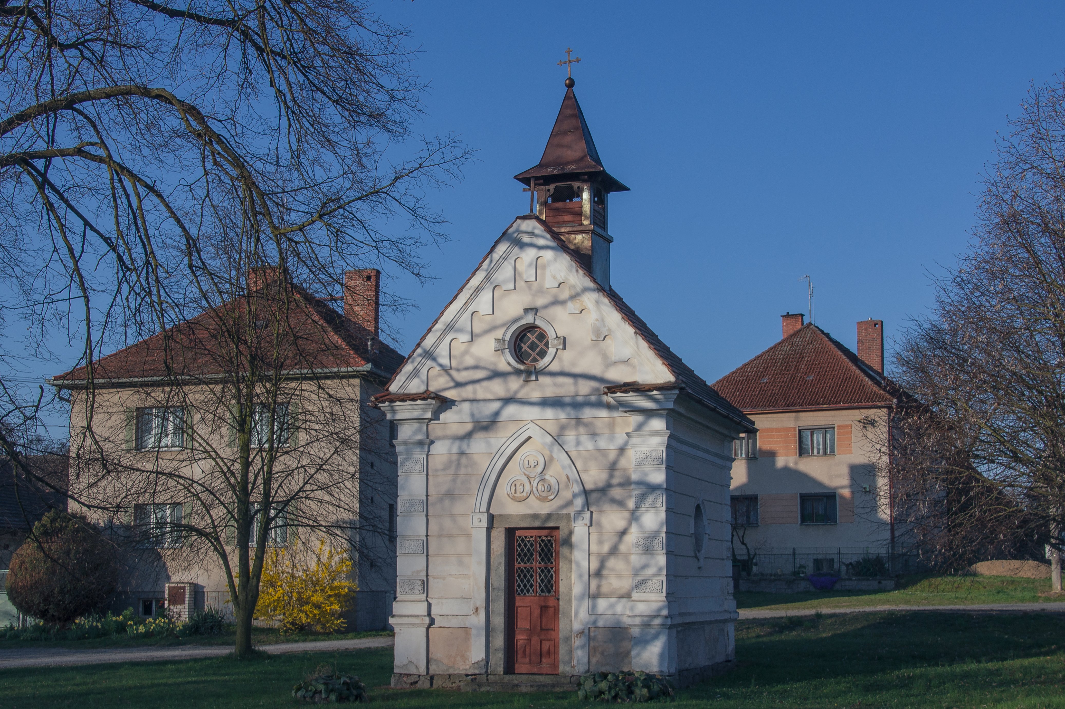 Novogotická zvonička z roku 1900 na želčanské návsi